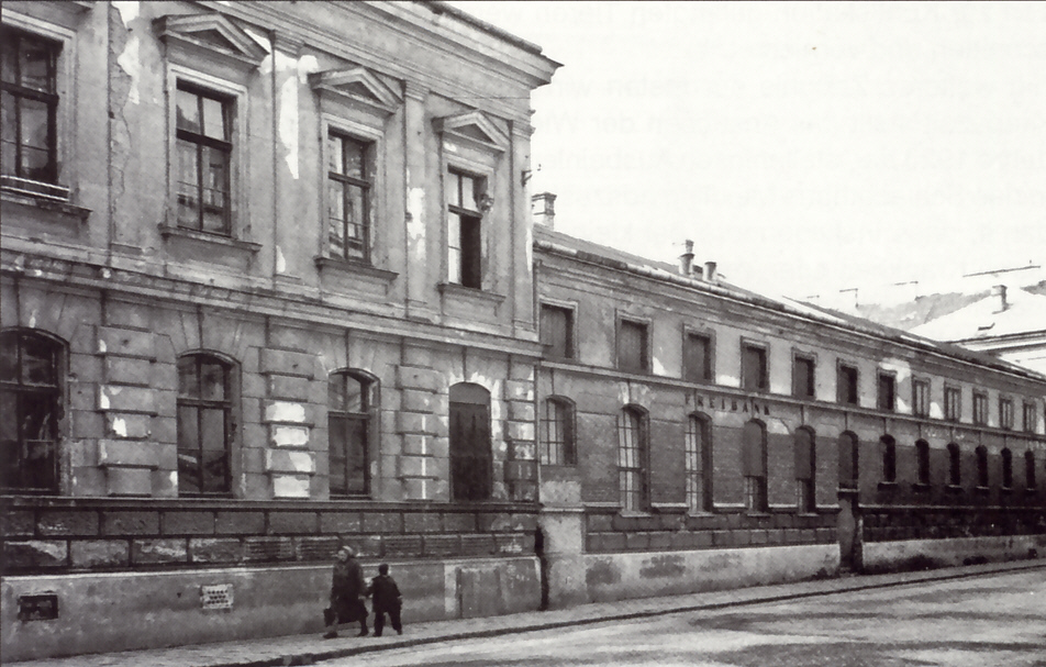 Schlachthaus Meidling, Ansicht Spittelbreitengasse ´mit Freibank (um 1900)